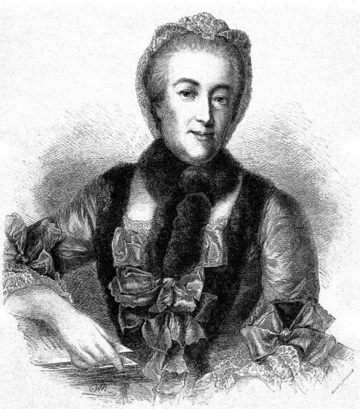 Henriette Karoline von Pfalz-Zweibrücken, Lndgräfin von Hessen-Darmstadt